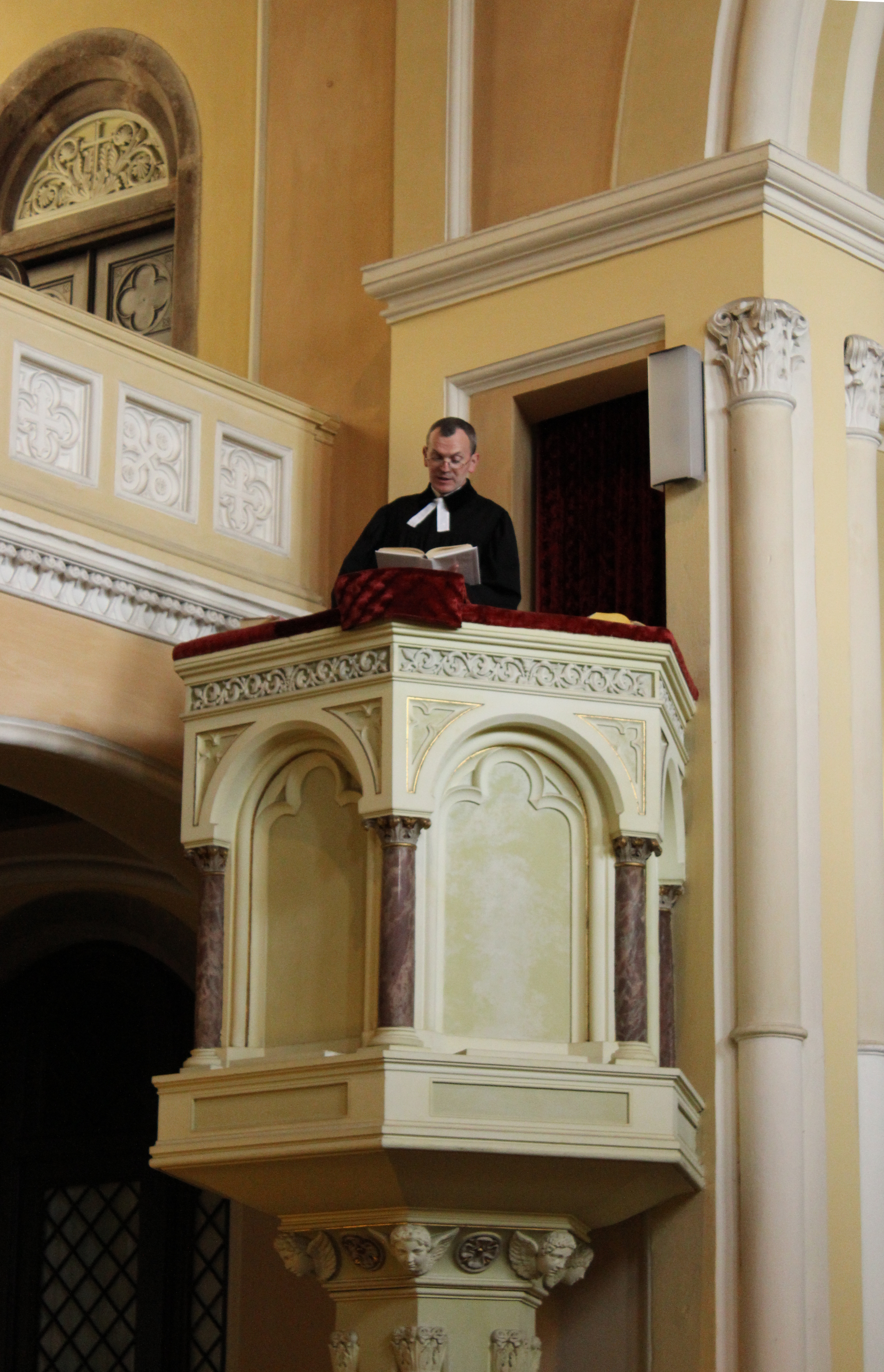 Kázající farář Daniel Matouš na kazatelně evangelického kostela na mariánskolázeňském Mírovém náměstí. This image was acquired during the event Wikiměsto Mariánské Lázně.